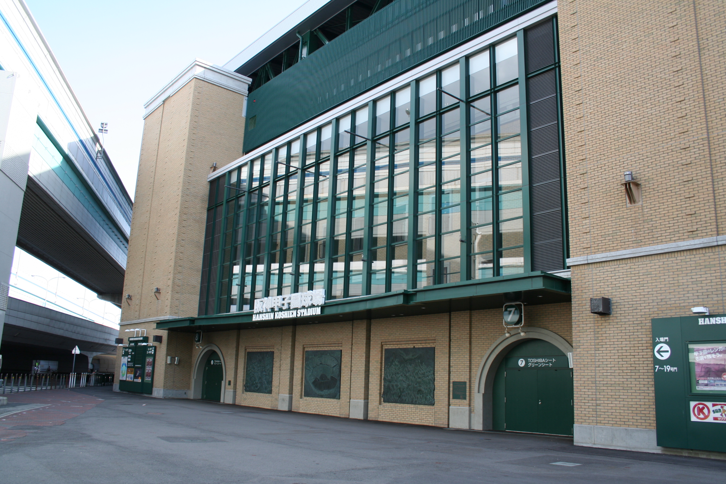 阪神甲子園球場の外周の風景。球場の北東部から時計回りに撮影。球場北にある出入り口。東側から撮影。左手にある高架は阪神高速3号神戸線。